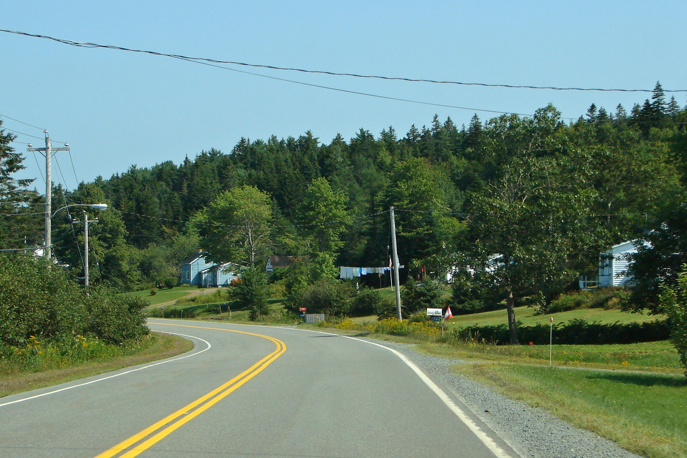 Dean, Nova Scotia, Canada